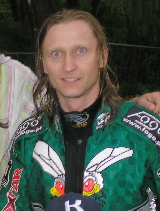 Adam Skórnicki w Poznaniu - Turniej z okazji 15-lecia startów Adama Skórnickiego